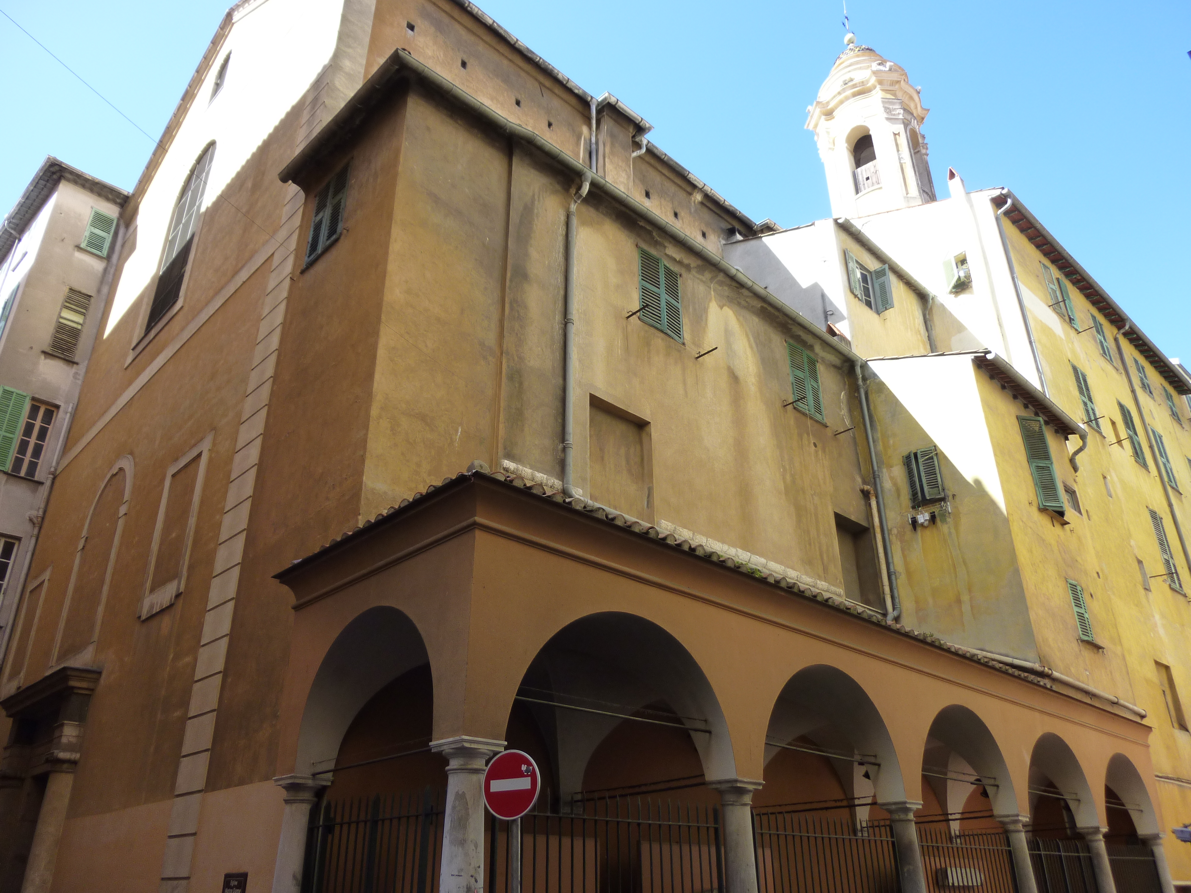 Église Sainte-Rita (Église de l'Annonciation) et Loge communale de Nice, (Alpes-Maritimes, France) .